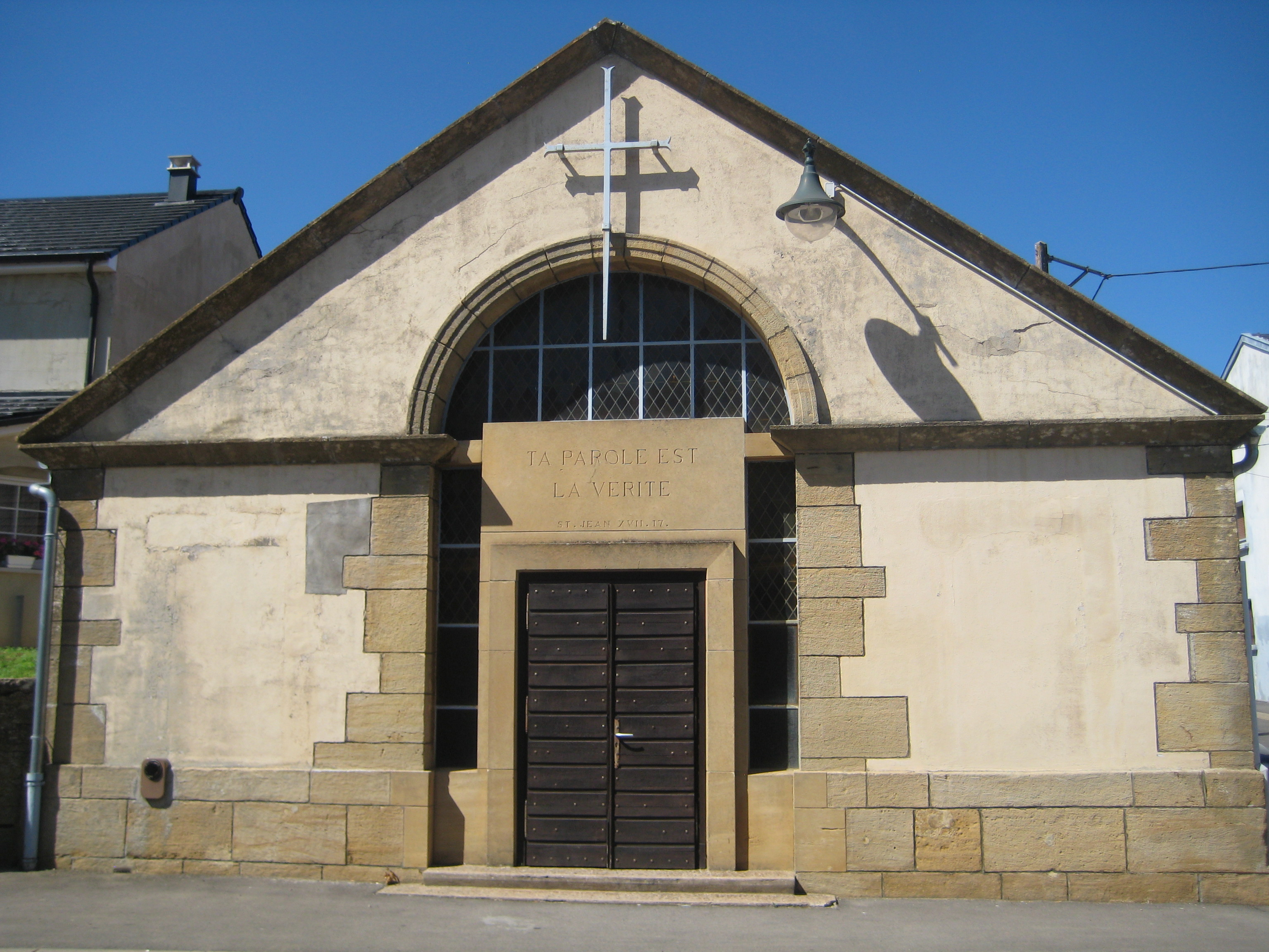 Description temple Aumetz temple Aumetz